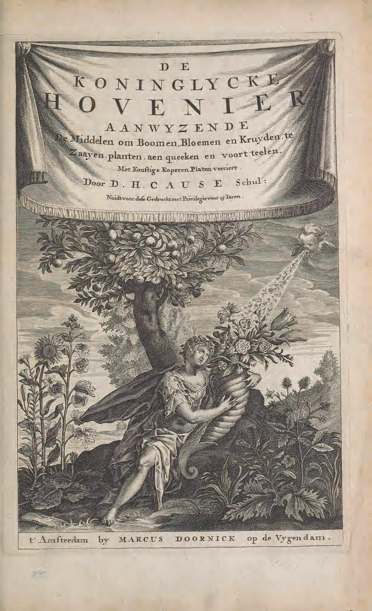 ^ Koning ly g O V E N I A A :Nr w -Y z i: isr i. Er gelden om Booinen.Bloemen enKaruy^^ jyen.planten.aen queeken en voort "tef^^ 3IetJü,nftije Koperen Platen verciert . I^oor D . H. C A U S E ScKt^i j';tia:rvt..!'i